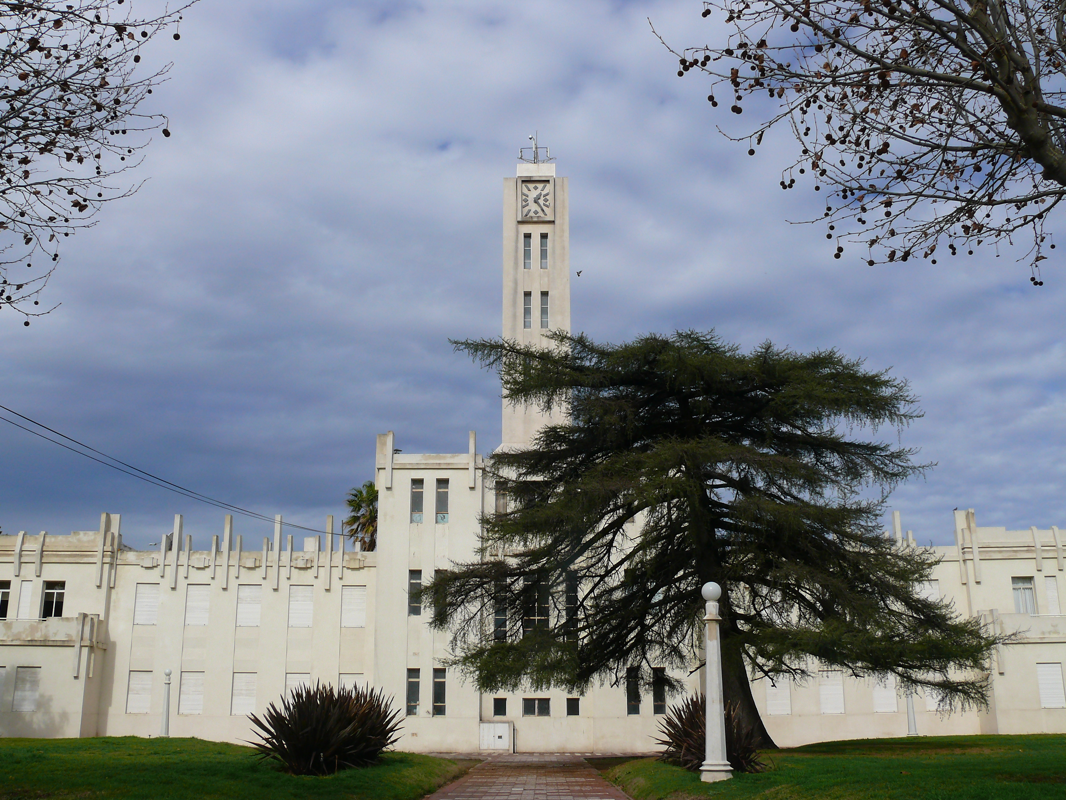 Palacio Municipal de Pellegrini